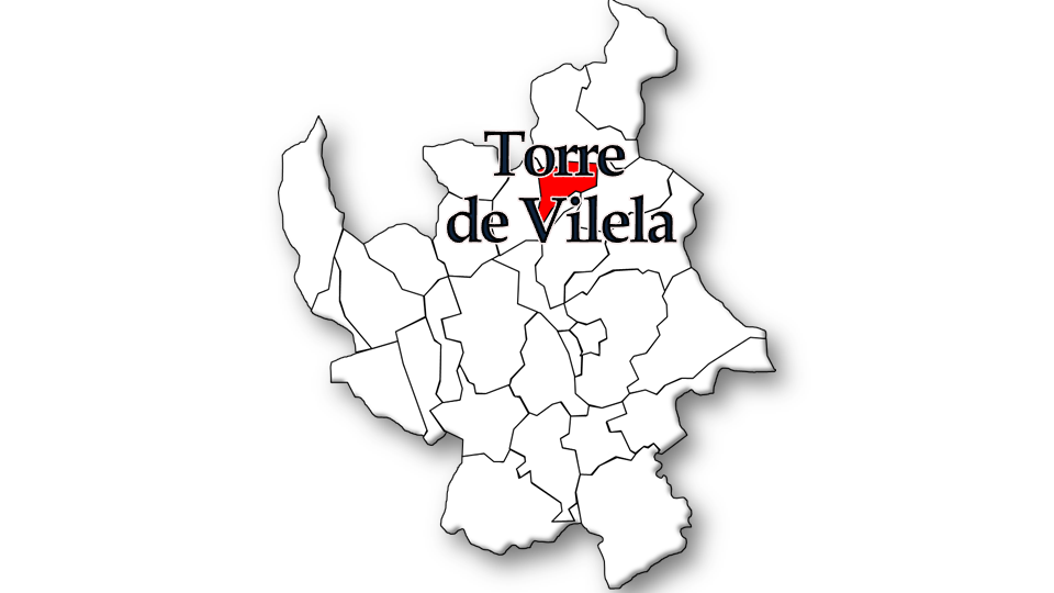 População